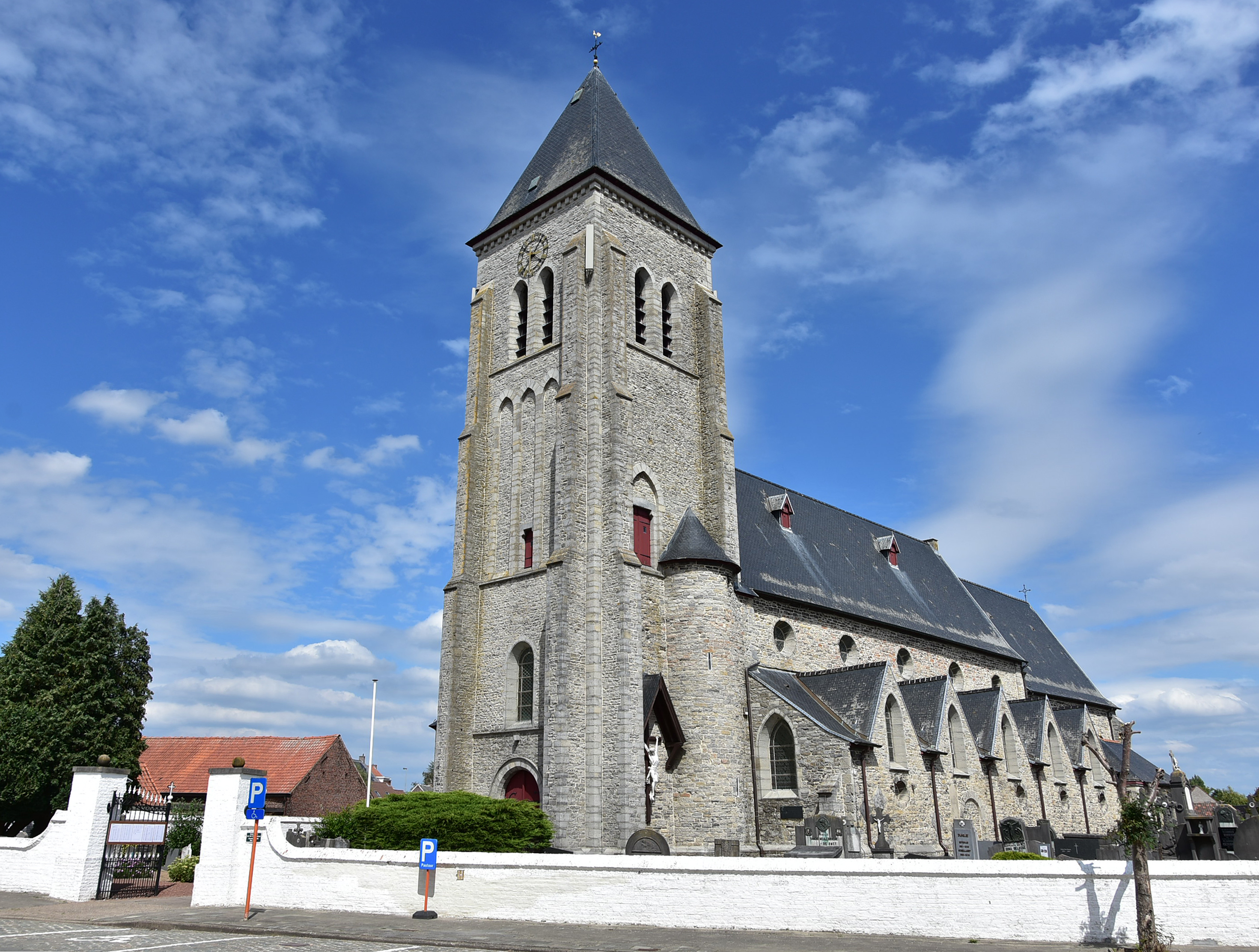 Sint-Martinuskerk (28229) Petegem-aan-de-Schelde 1-08-2020